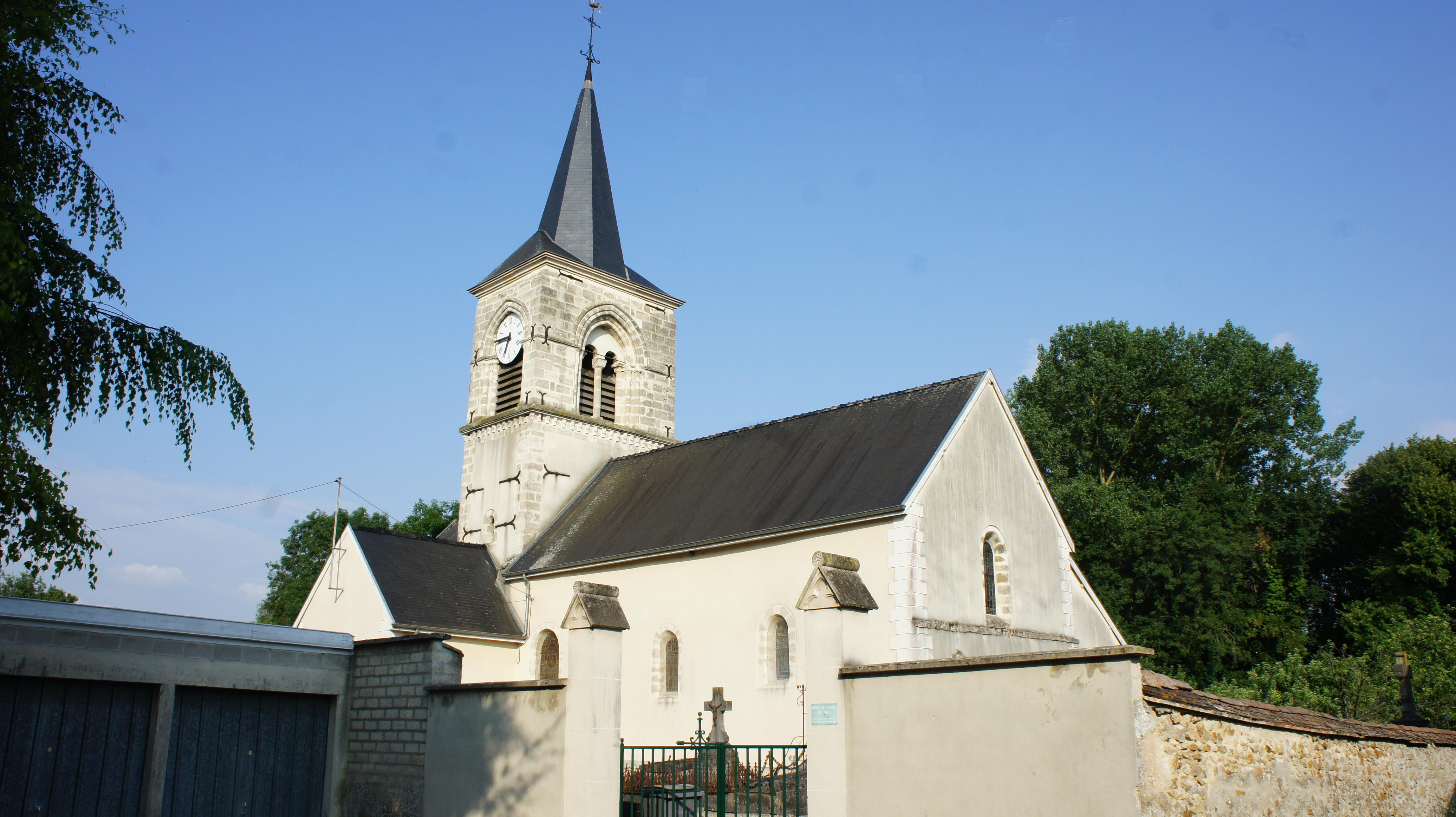 Une vue de .